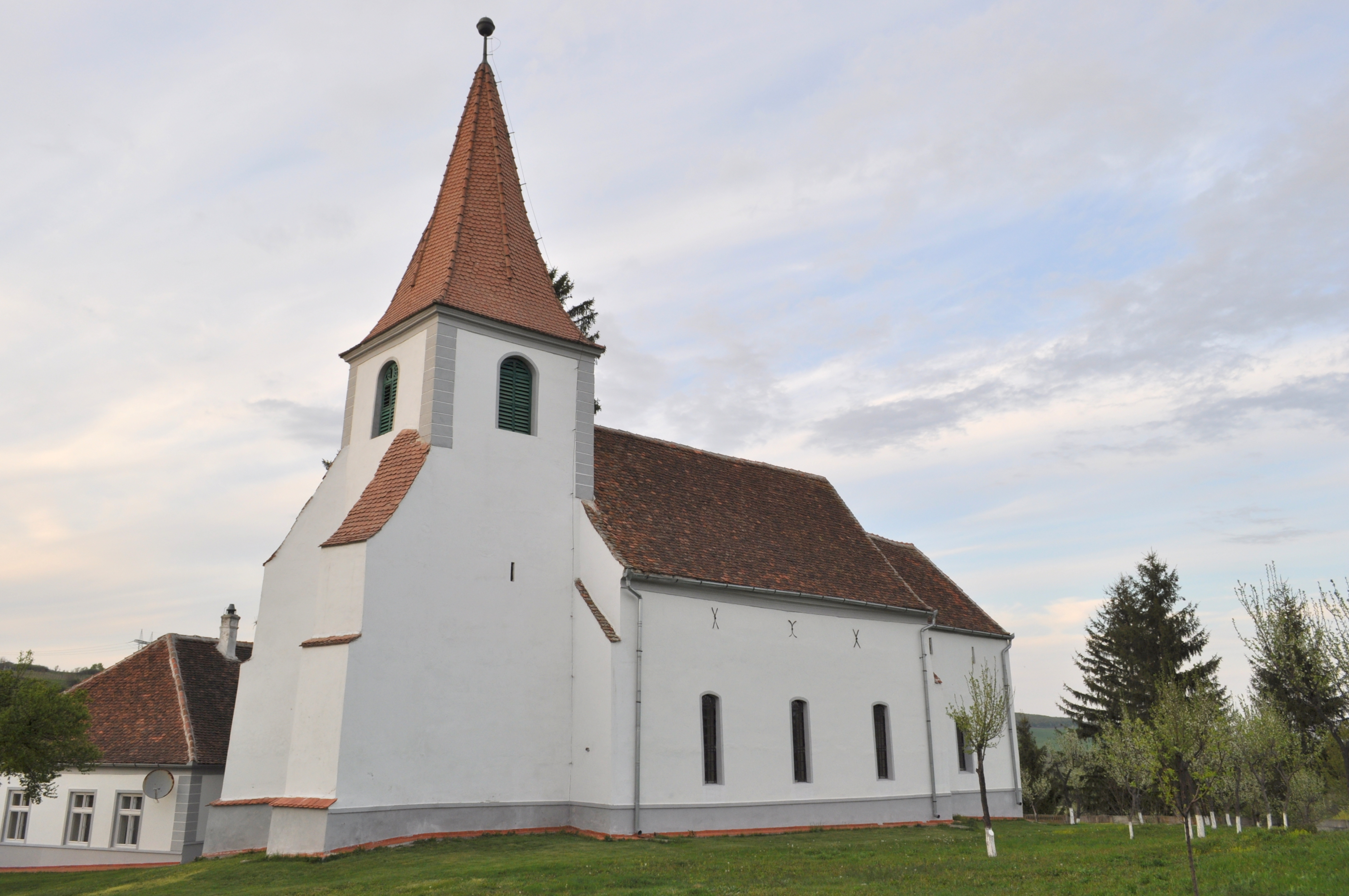 Biserica evanghelică din satul Reciu, județul Alba